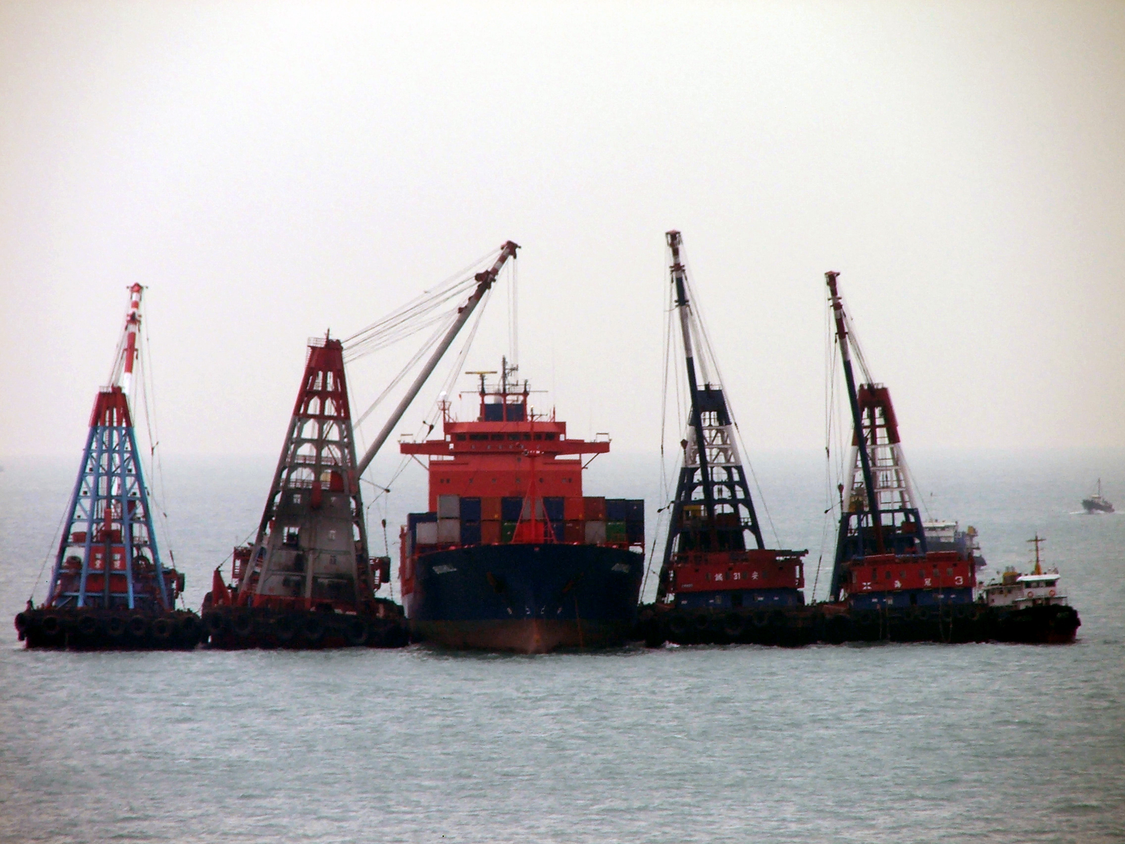 Hong Kong Derrick Bargen arbeiten an einem Containerschiff vom Typ BV 1600